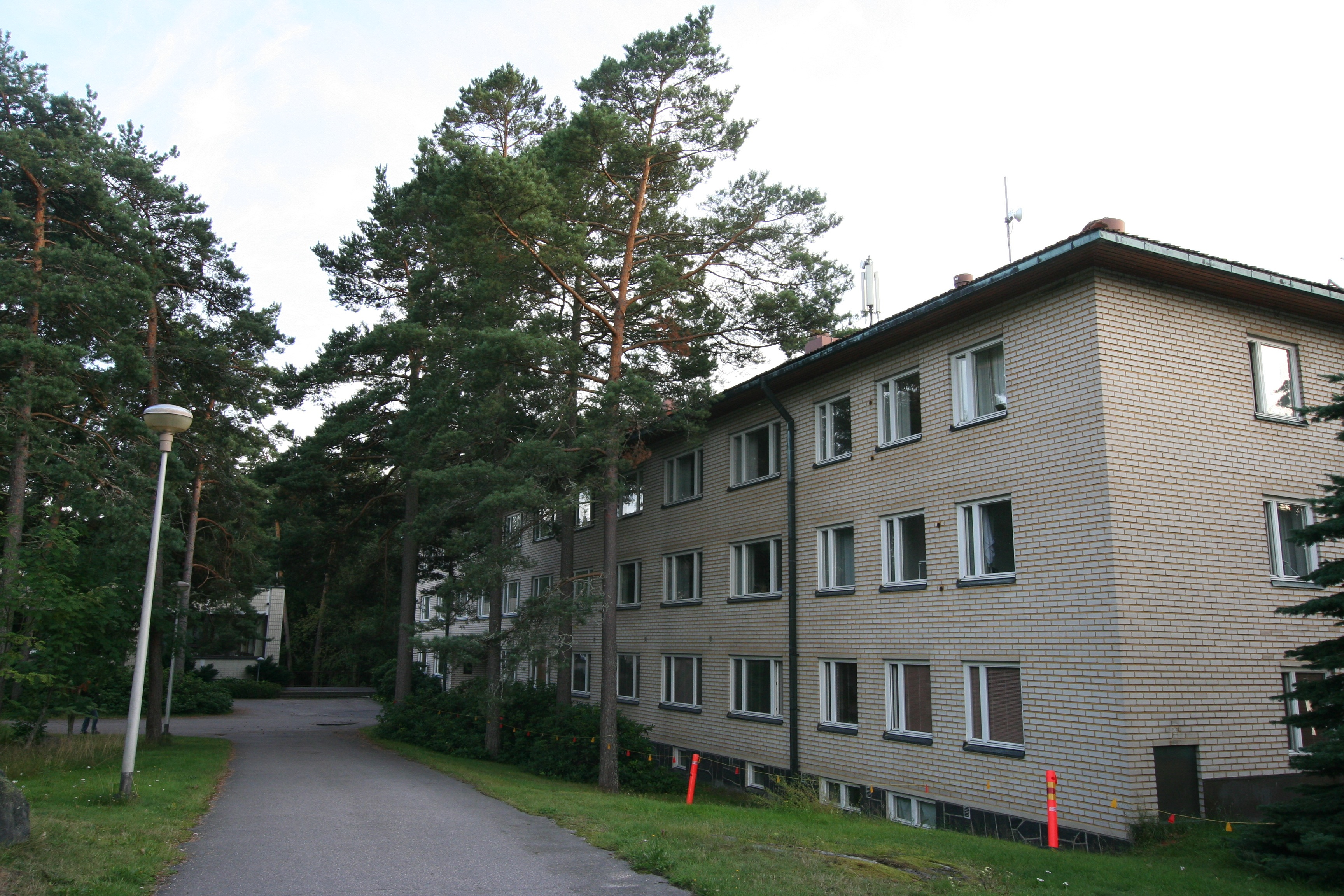 Sofian kulttuurikeskuksen rakennuksia